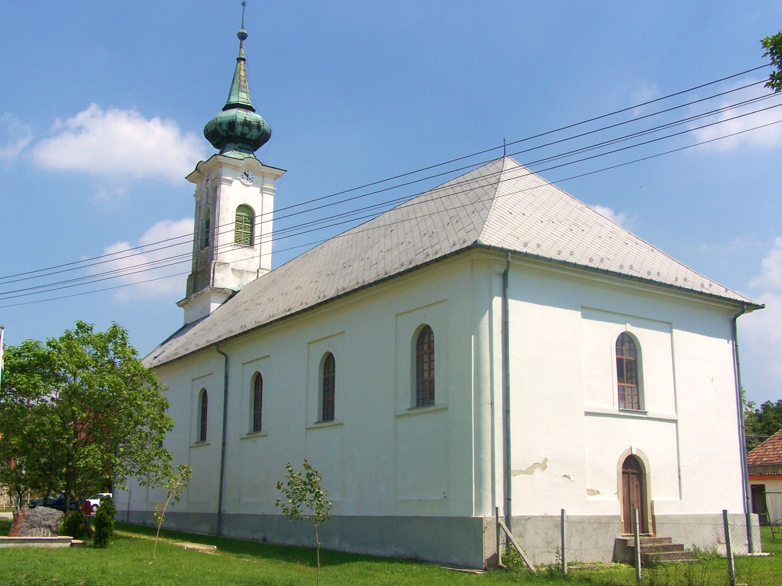 Ref. templom (Mány, Béke tér 7.) This is a photo of a monument in Hungary. Identifier: 3686